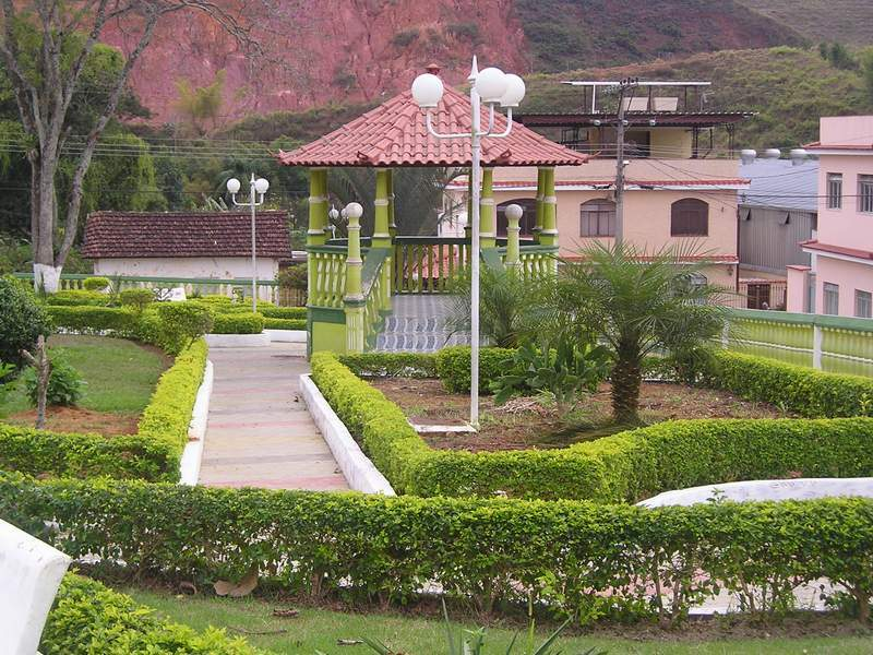 Praça Municipal em Guarará-MG